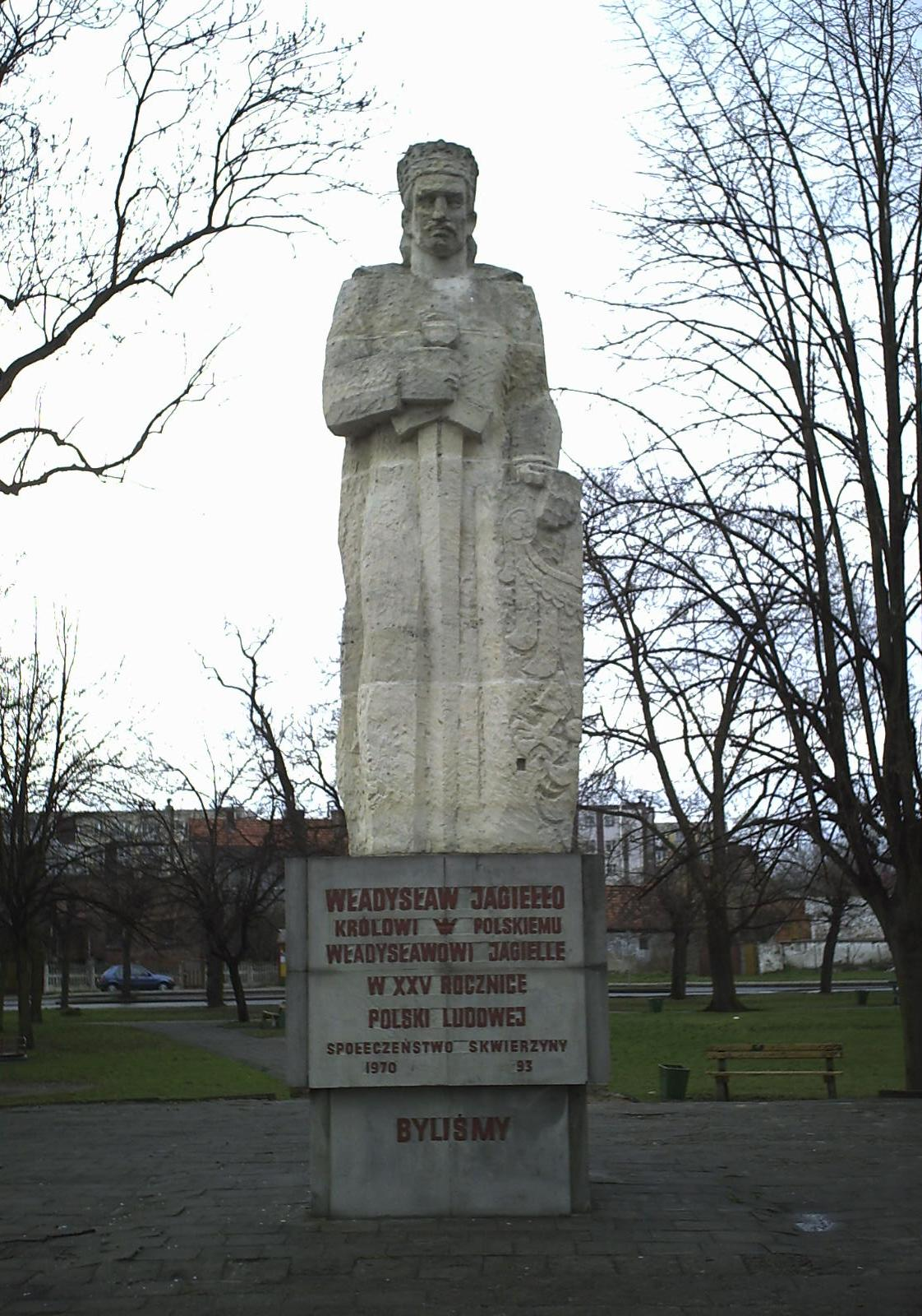 King Wladyslaw Jagiello's Statue, Skwierzyna (lubuskie voivodship), Poland.